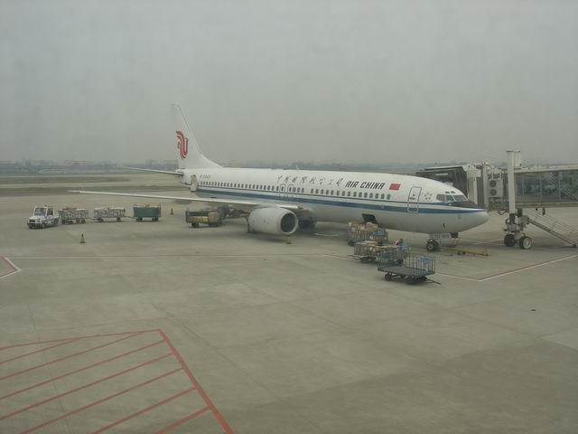 机场